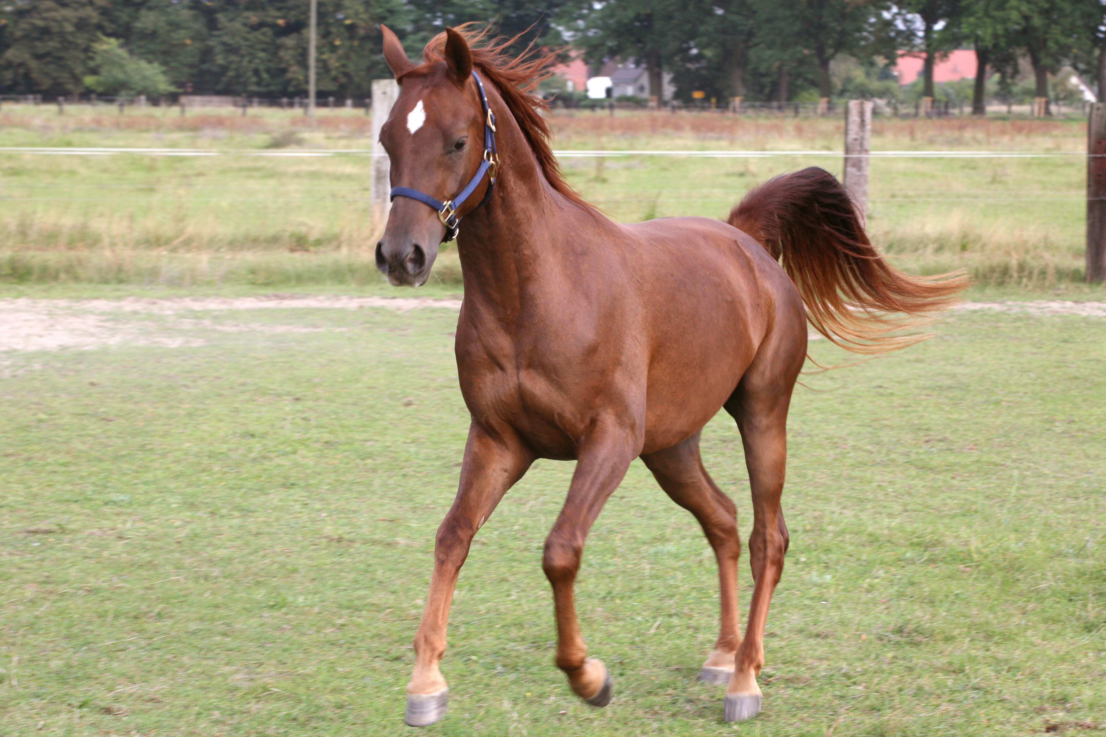 Halbprofil von GH Kamsin